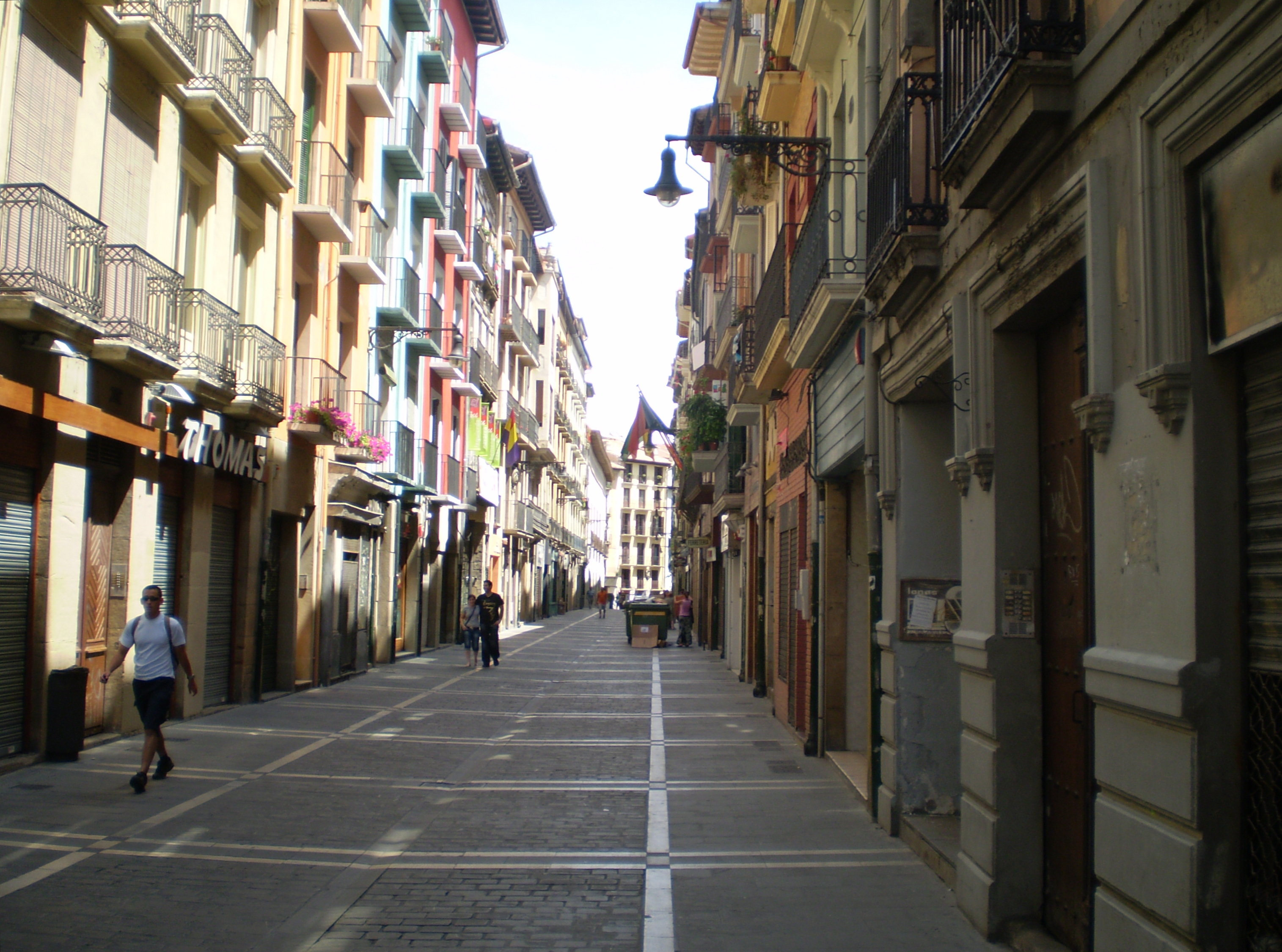 Calle mayor de Pamplona (Navarra-España) Iruñeko kale nagusia (Nafarroa-Euskal Herria)